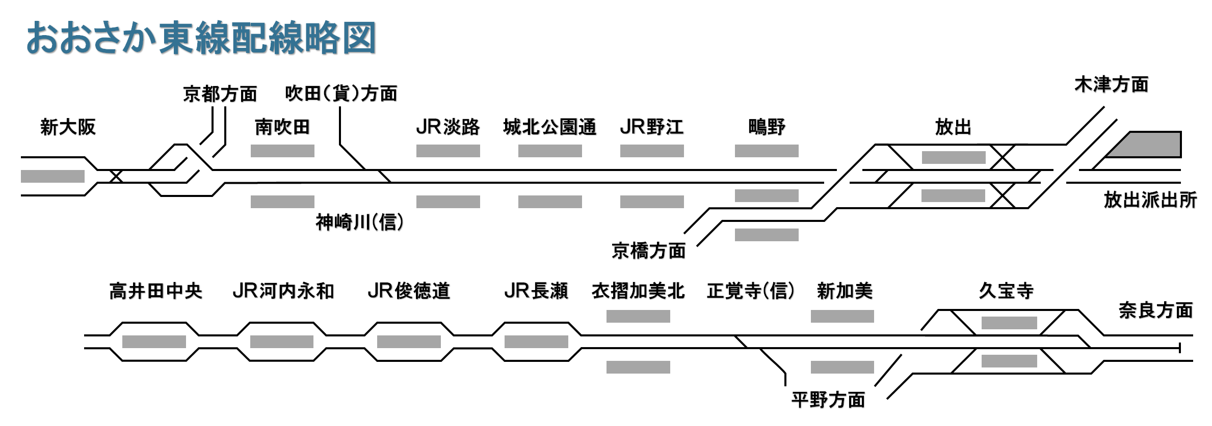 おおさか東線配線略図